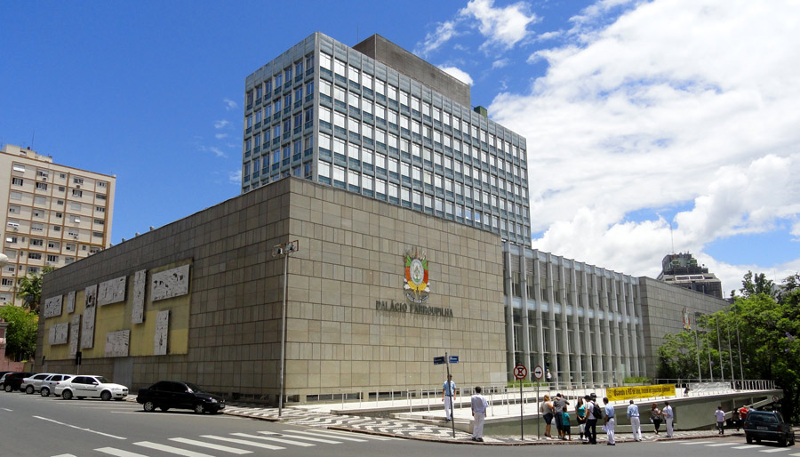 Palácio Farroupilha, sede da Assembléia Legislativa do estado do Rio Grande do Sul. Porto Alegre, Brasil.